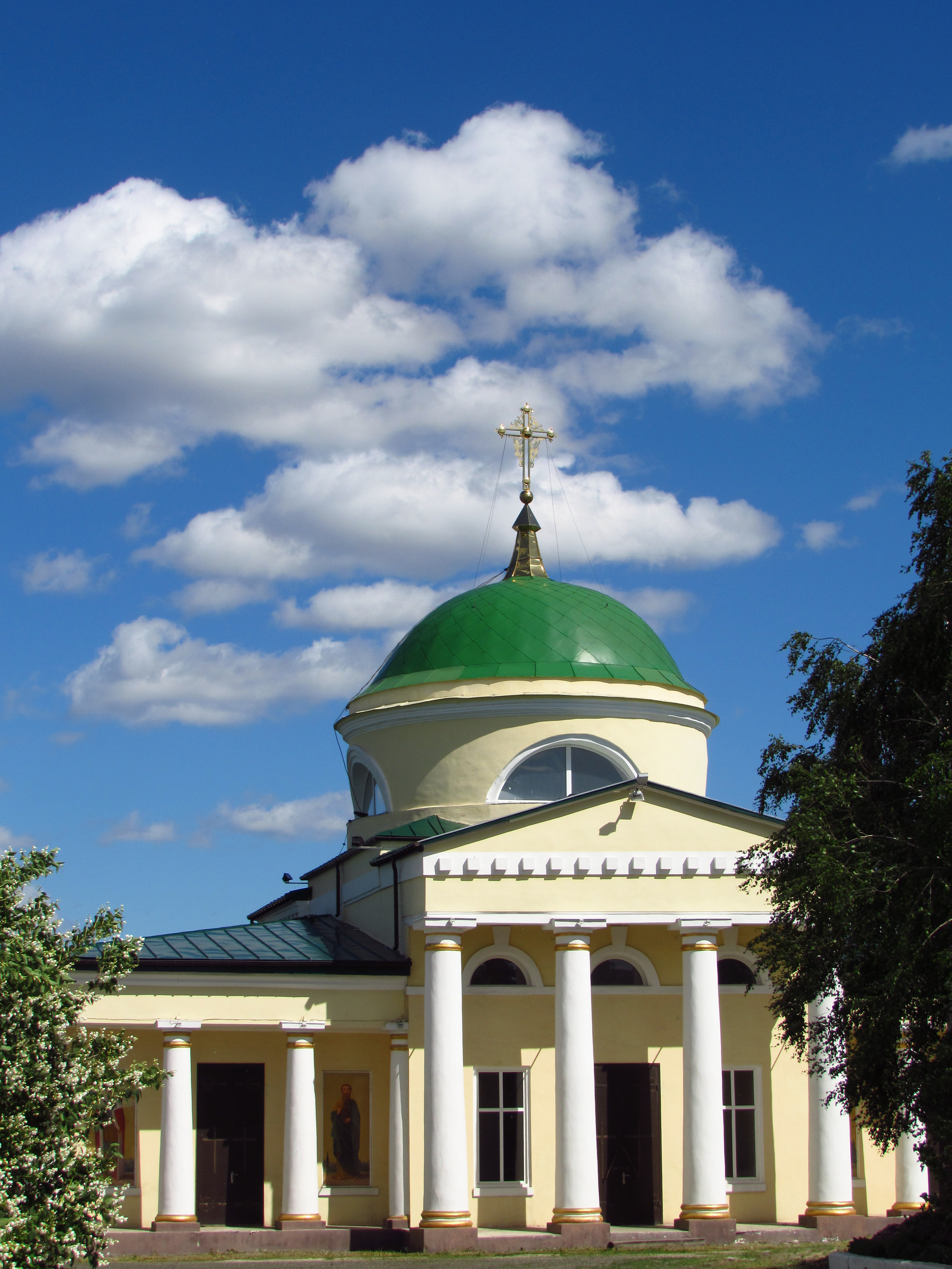 Церква Різдва Христового (мур.), Охтирка, вул. Пушкіна, 1